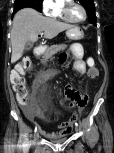 This image is part of a series which can be scrolled interactively with the mousewheel or mouse dragging. This is done by using Template:Imagestack. The series is found in the category Gallstone perforation with intestinal necrosis and ileus - case 001. Aus der Gallenblase perforierter Gallenstein, der im Dünndarm zu einer Nekrose geführt hat und so auch zu einem Ileus, ohne selbst direkt okkludierend zum Ileus zu führen. Ein in früheren Voruntersuchungen nachweisbarer großer Stein in der Gallenblase war hier nicht mehr zu finden. Man meint in einigen Schichten, ihn in der dilatierten nekrotischen Dünndarmschlingen zu erahnen. Neu aufgetretene Aerobilie. Kleine Verhaltformation am Duodenum, wohl an der Perforationsstelle.